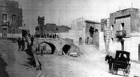 Birkirkara, Valley road circa 1900